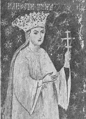 Doamna Elisabeta Movilă, pictură murală la Mănăstirea Suceviţa